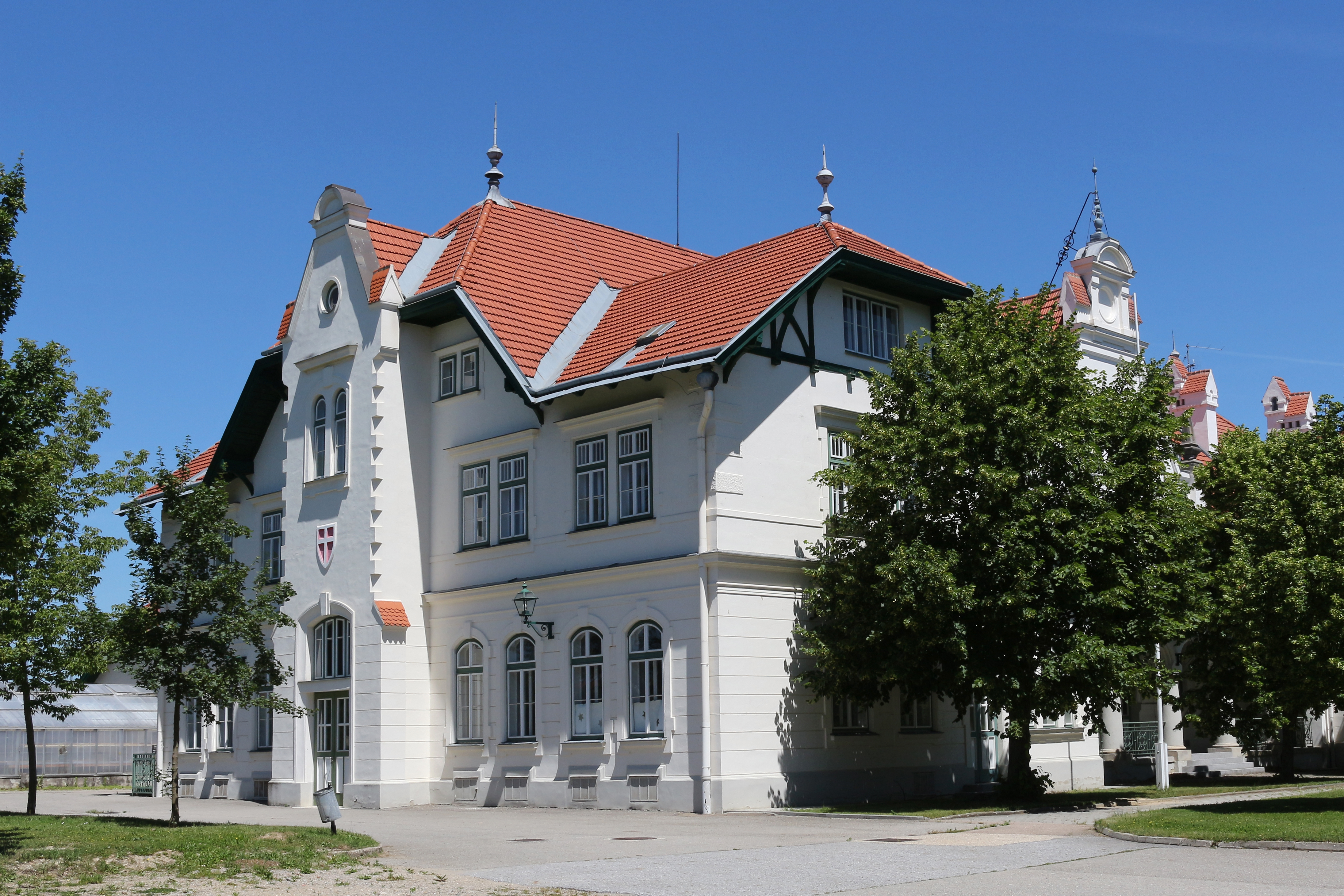 Verwaltungsgebäude mit Wappen der Gemeinde Wien im Jugendheim Lindenhof